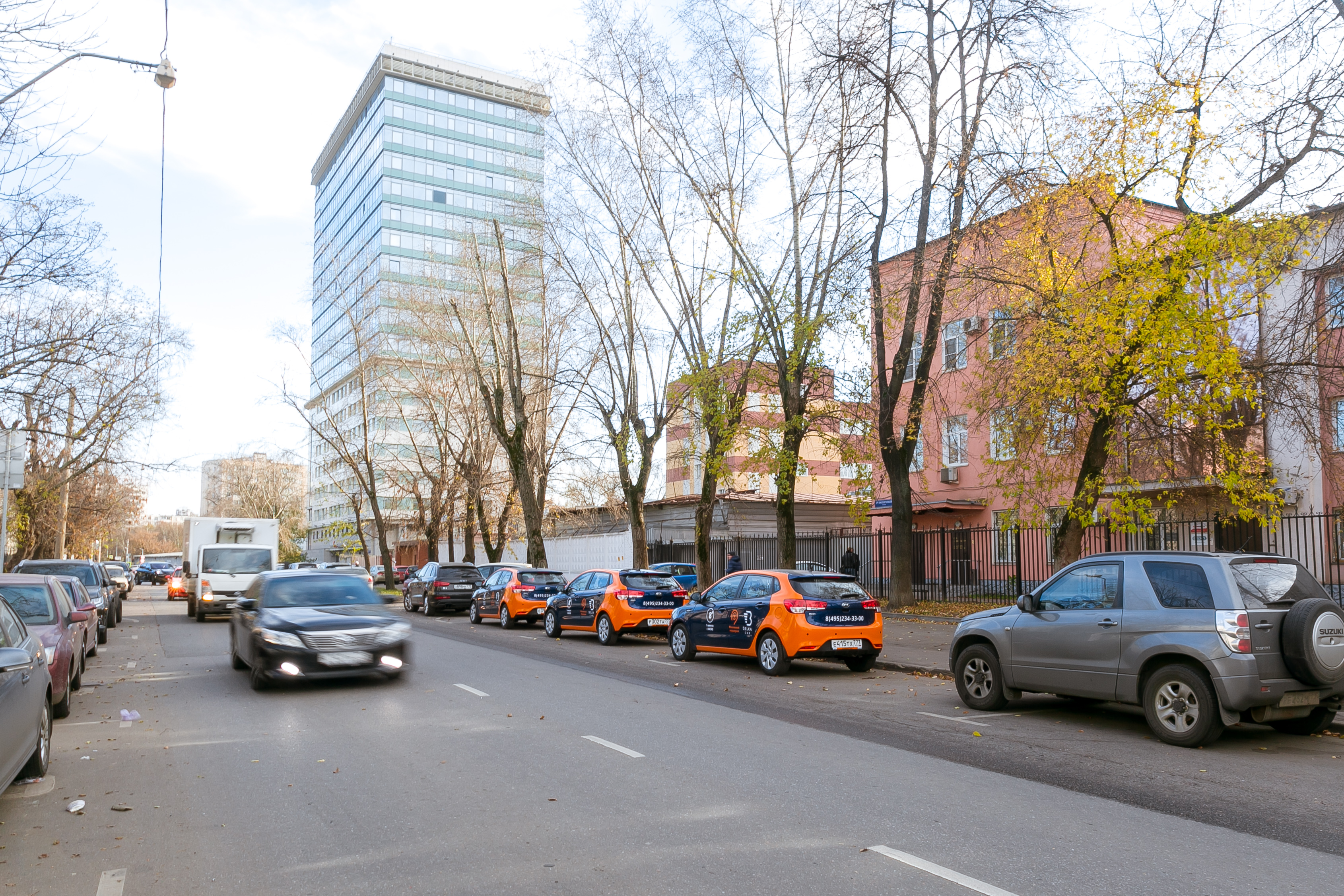 Автомобили BelkaCar. Москва, 5-я улица Ямского Поля, вид в сторону центра. Башня - Бизнес-центр «Solutions-Ямское поле» 2008 года. Малоэтажные корпуса- АО "Дукс" (бывший завод "Коммунар", бывший 30-й авиазавод...). Основная продукция - ракеты Р-73, Р-73Э и их пусковые устройства